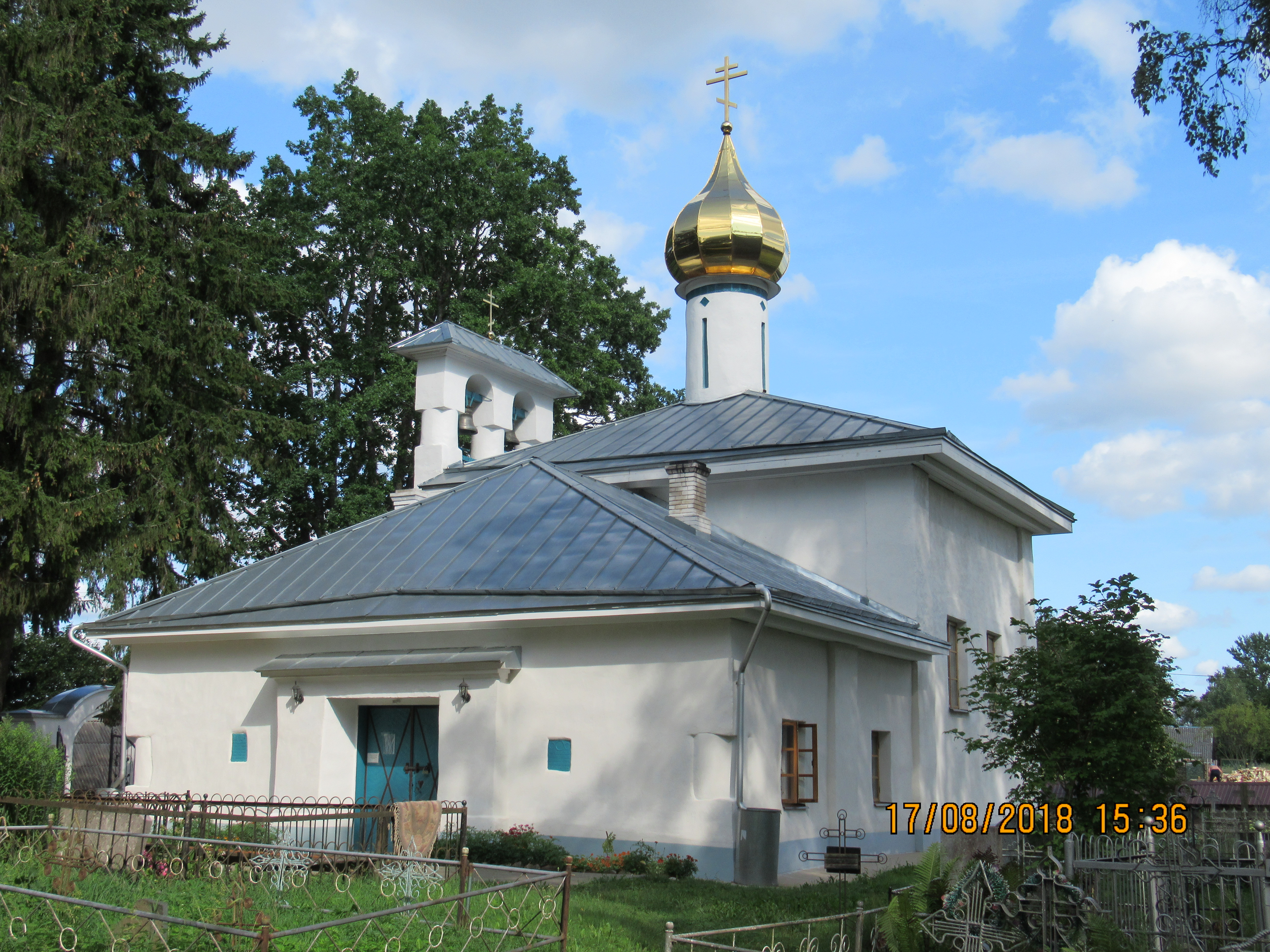 Tailovo Nikolai kirik